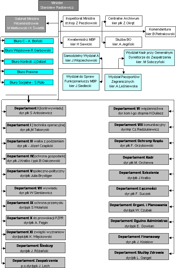 Centrala Ministerstwa Bezpieczeństwa Publicznego w Warszawie maj 1953 r